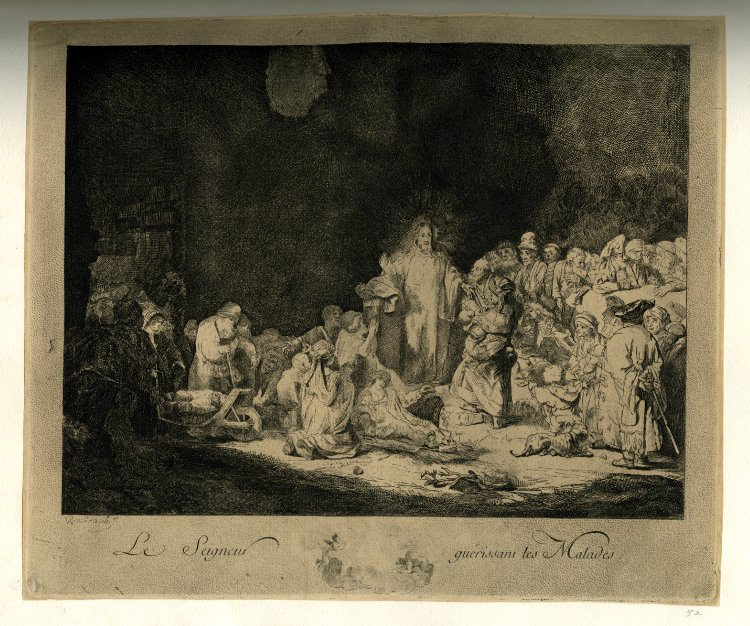 Jacques-Philippe Le Bas, Le Seigneur guérissant les malades, British Museum. Copie inversée de La Pièces aux cent florins de Rembrandt. 1755, pour le Recueil Basan.